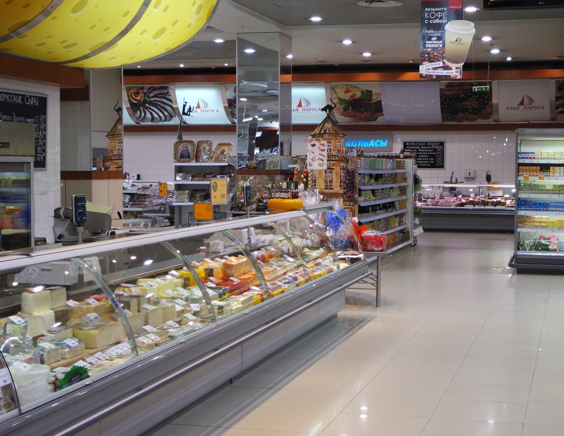 Отдел сыров универсама «Алые паруса» в торговом комплексе «Щука»